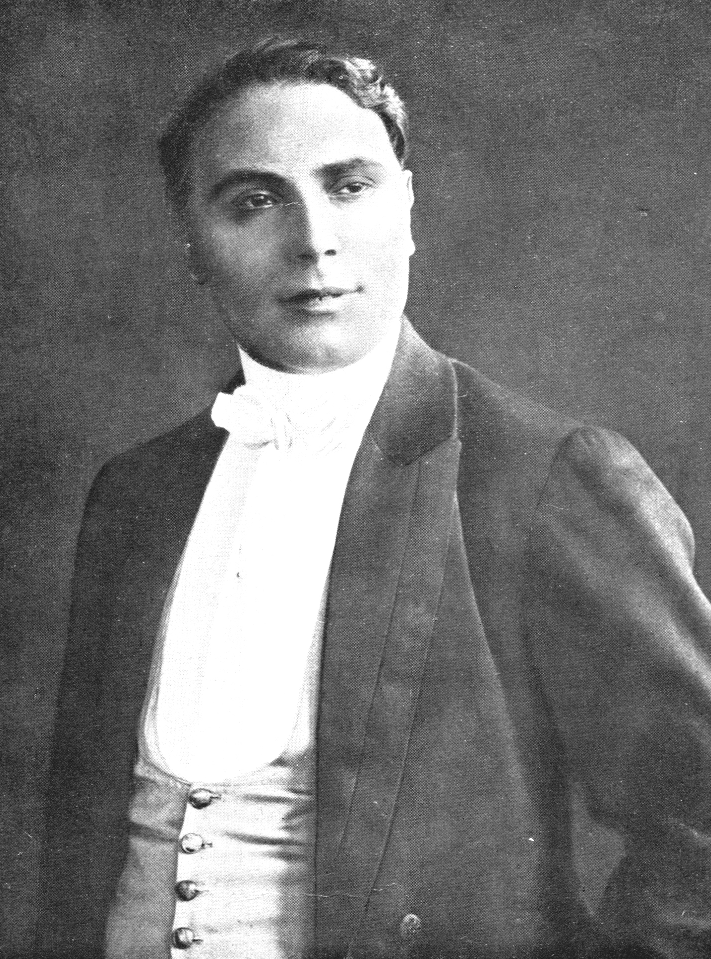 L'attore e regista Ubaldo Maria Del Colle in una immagine del 1914